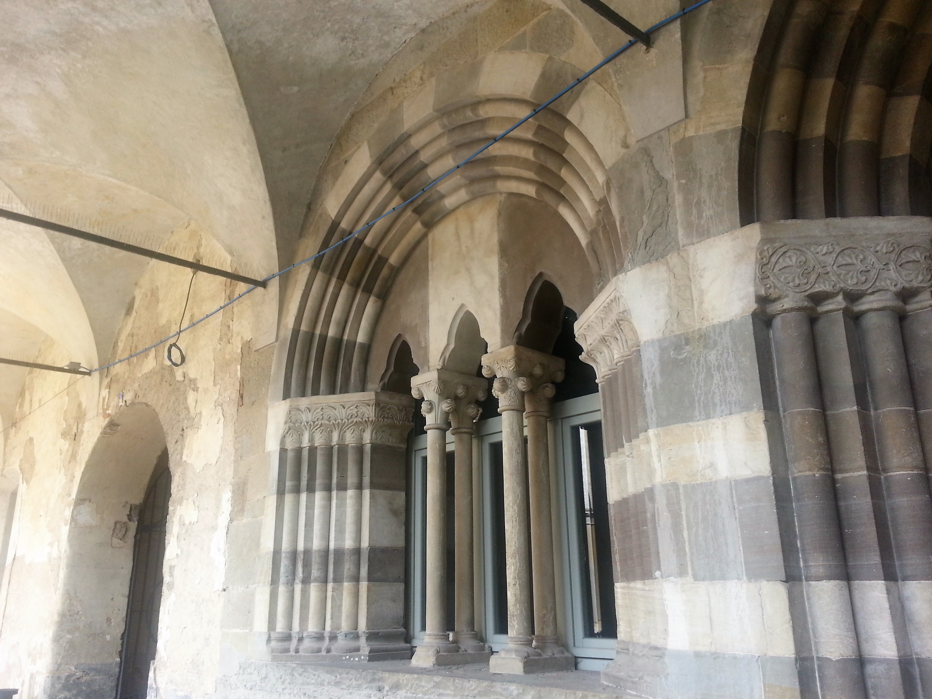 Trifora bicroma del chiostro minore di sant'Agostino Bergamo